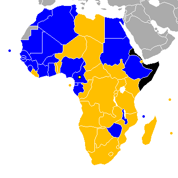 Mapa representativo da classificação dos países na Copa Africana de Nações de 2021.